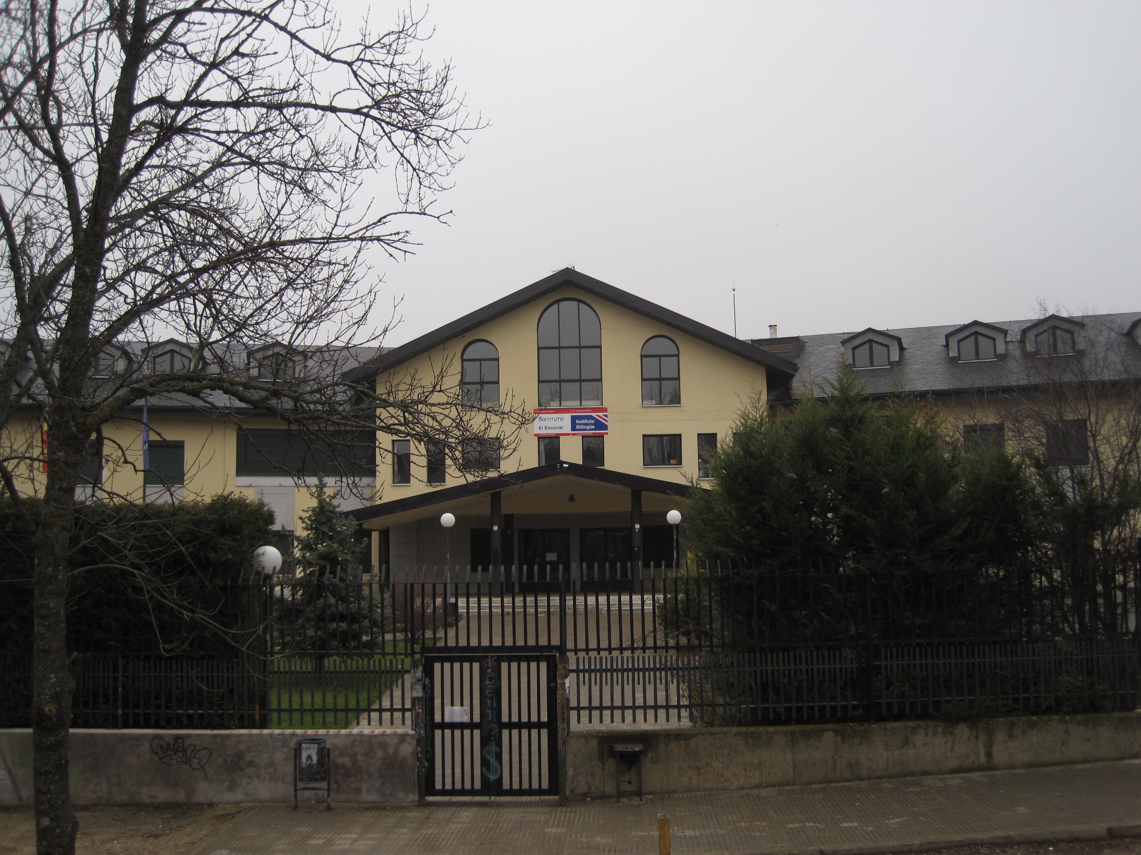 Instituto de Educación Secundaria de El Escorial (Madrid, España).